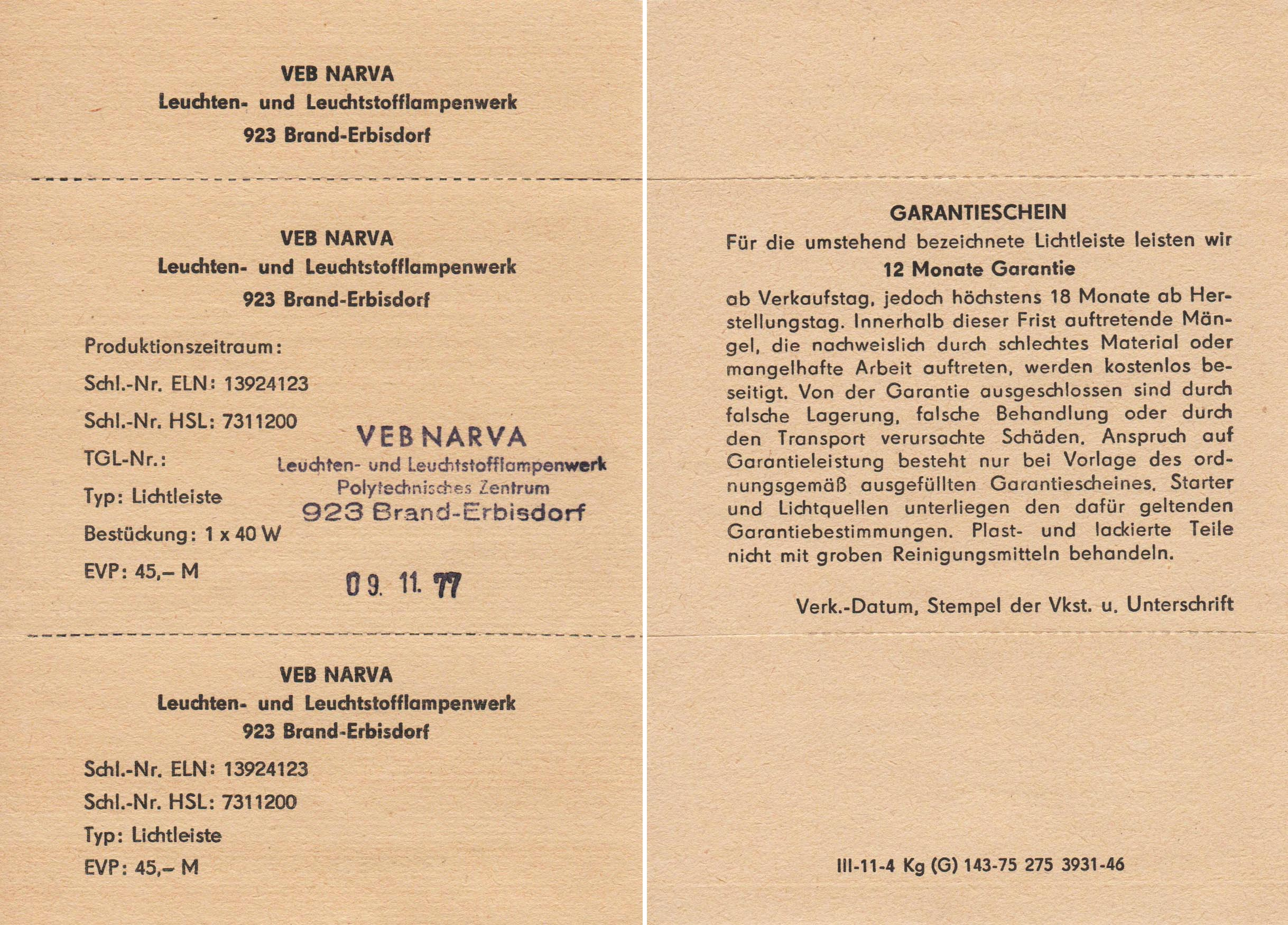 Der Produktanhänger von DDR-Erzeugnissen beinhaltete technische und kaufmännische Angaben zur Ware, wie hier die Bestückung, den Einheitsvertriebspreis und den Garantieschein.